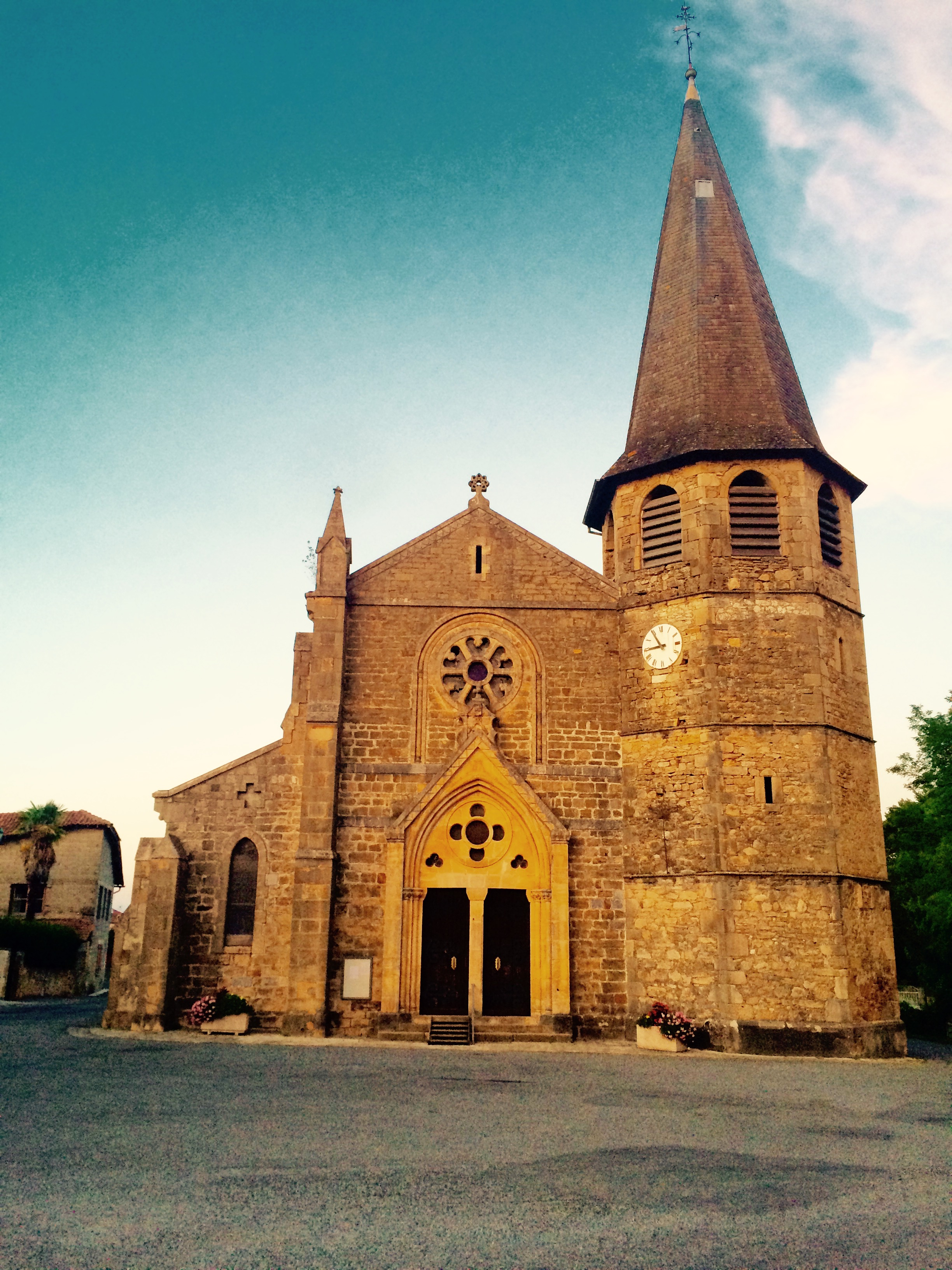 Eglise de Saint Plancard